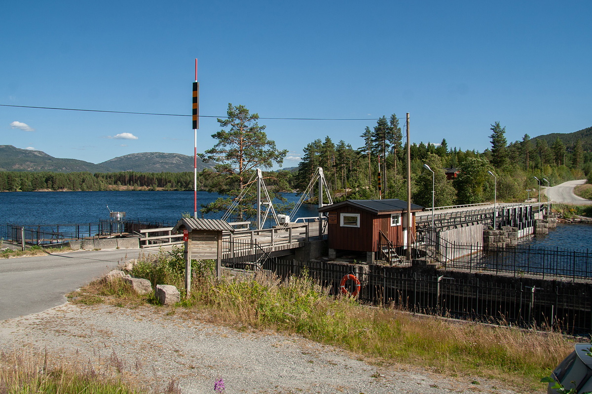 Storstraum sluse fra 1914 og Storstraumen bru fra 1965.